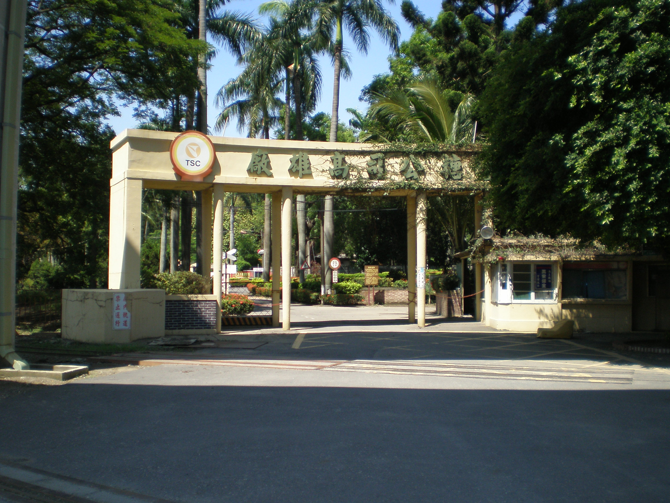 台灣糖業公司高雄廠正門。